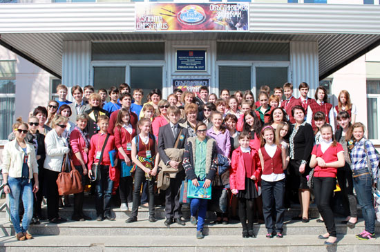 Общая фотография участников "-й Конференции в 2013 году